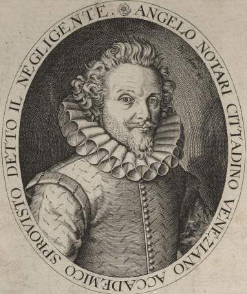 L'immagine è un dettaglio di una incisione di William Hole, che la pubblicò nel 1613 (oggi ospitati nel Fitzwilliam Museum, Cambridge).